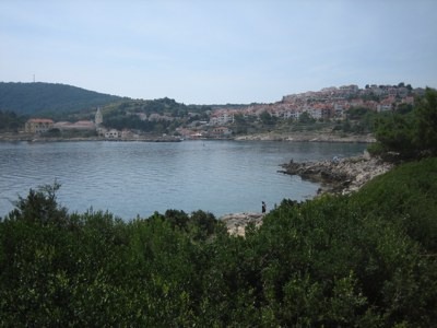 Sveti Martin near Mali Losinj, Croatia / Naselje i uvala Sveti Martin u Malom Lošinju